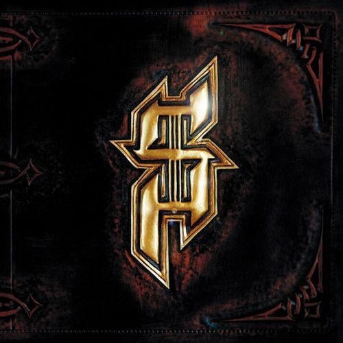 Cover des Albums „Samy Deluxe“